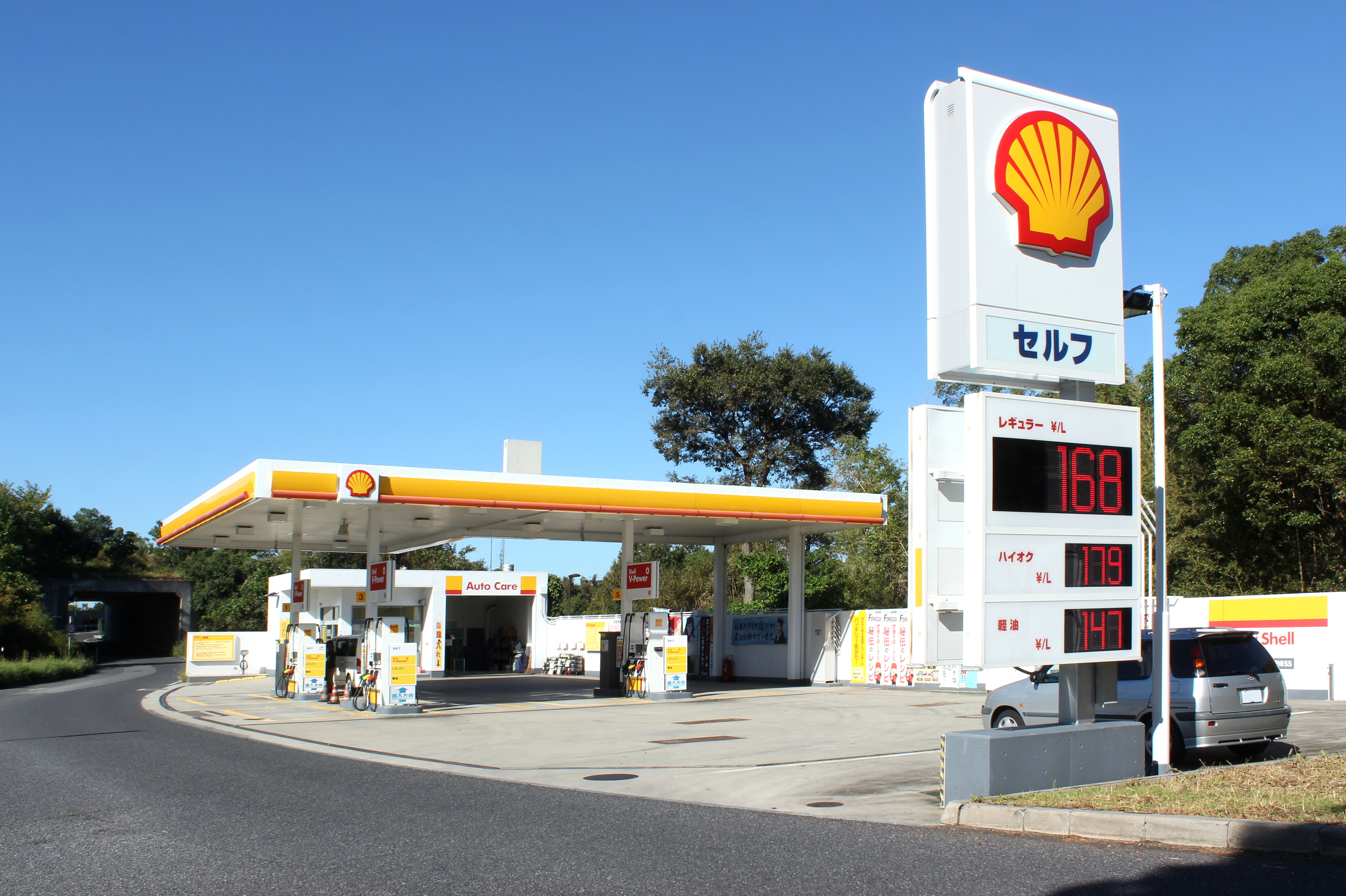 刈谷ハイウェイオアシスのガソリンスタンド（下り線側）